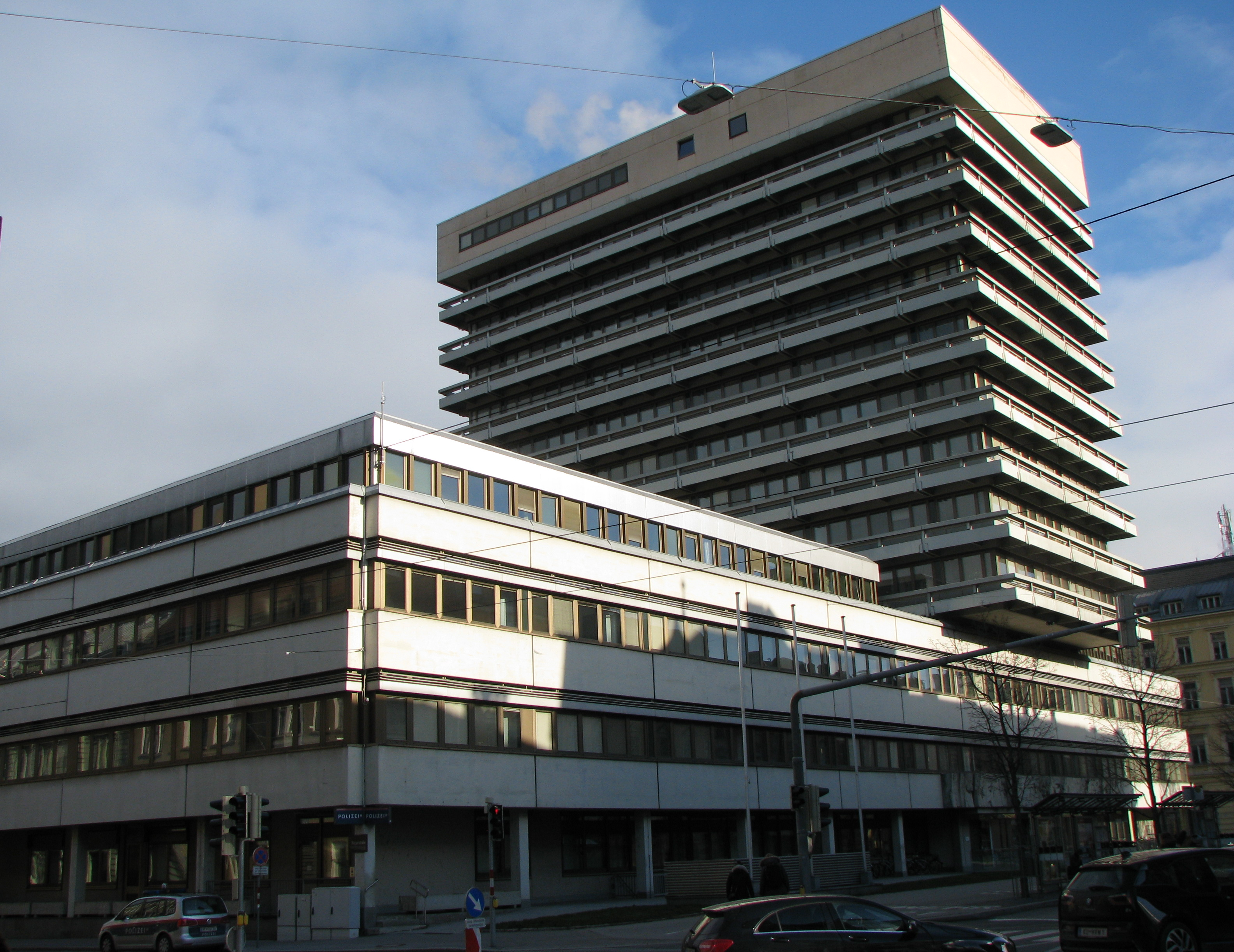 Oberlandesgericht und Landesgericht Innsbruck, Neubau (Architekten: Karl und Charlotte Pfeiler, 1973)